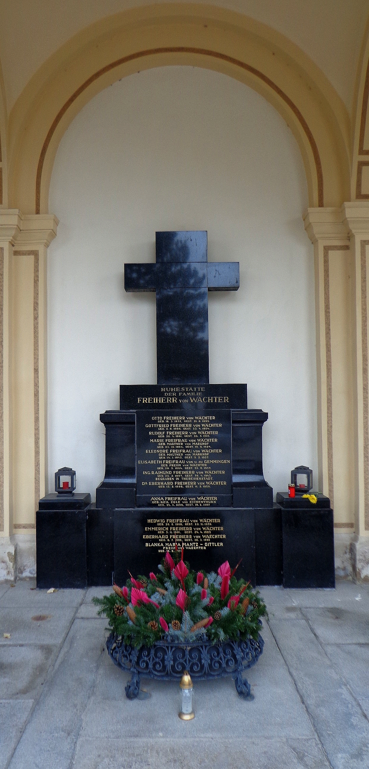 Wiener Zentralfriedhof, Alte Arkaden, Gruft Nr. 33: Grabstätte der Freiherren von Wächter, ehrenhalber gewidmetes Grab von Eberhard Waechter